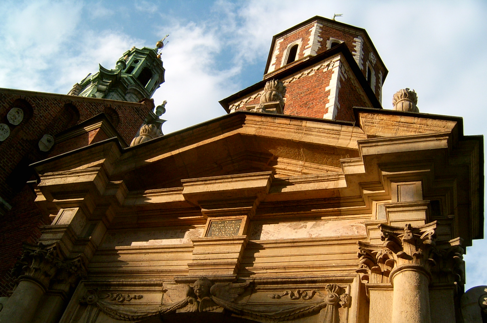 Kraków, Poland